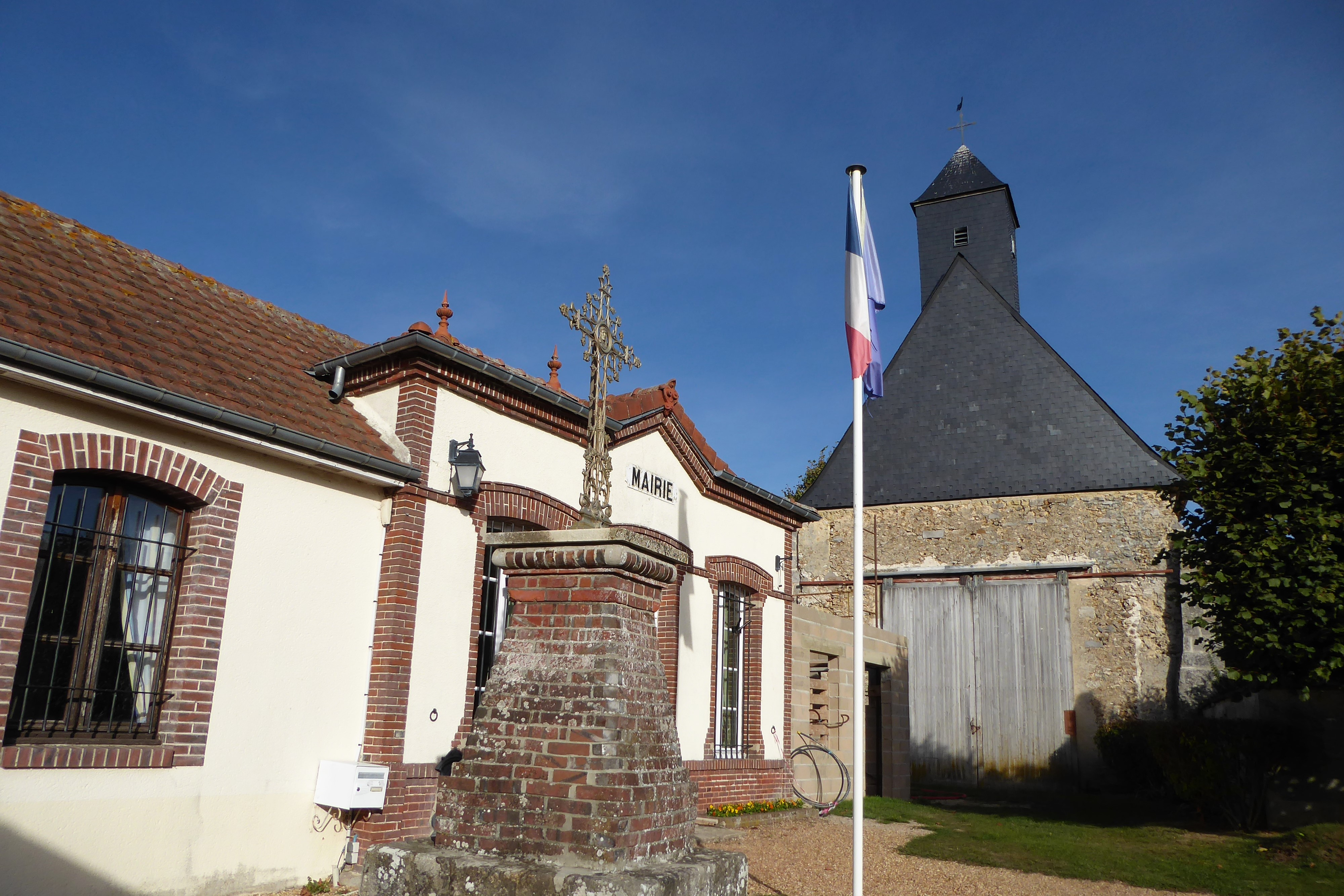 mairie et église Saint-Martin des Pinthières, Eure-et-Loir, France.